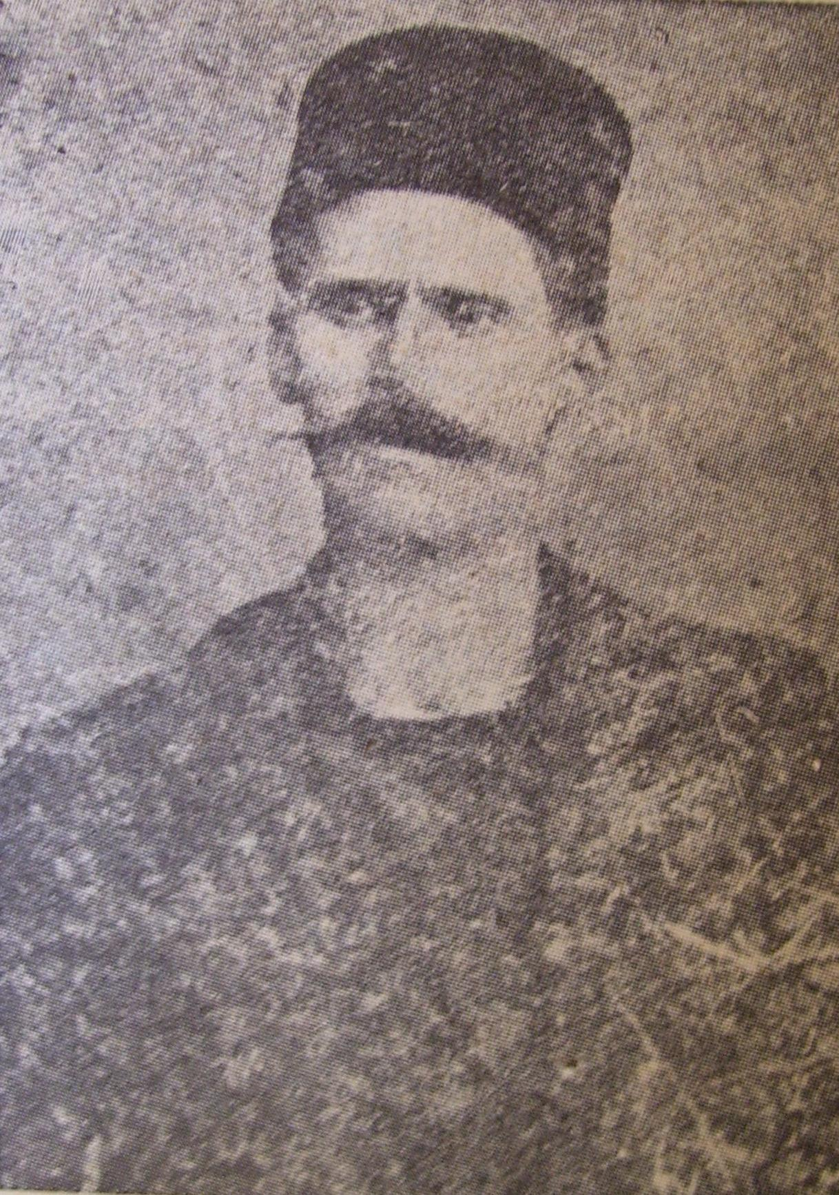 Щило Ковански